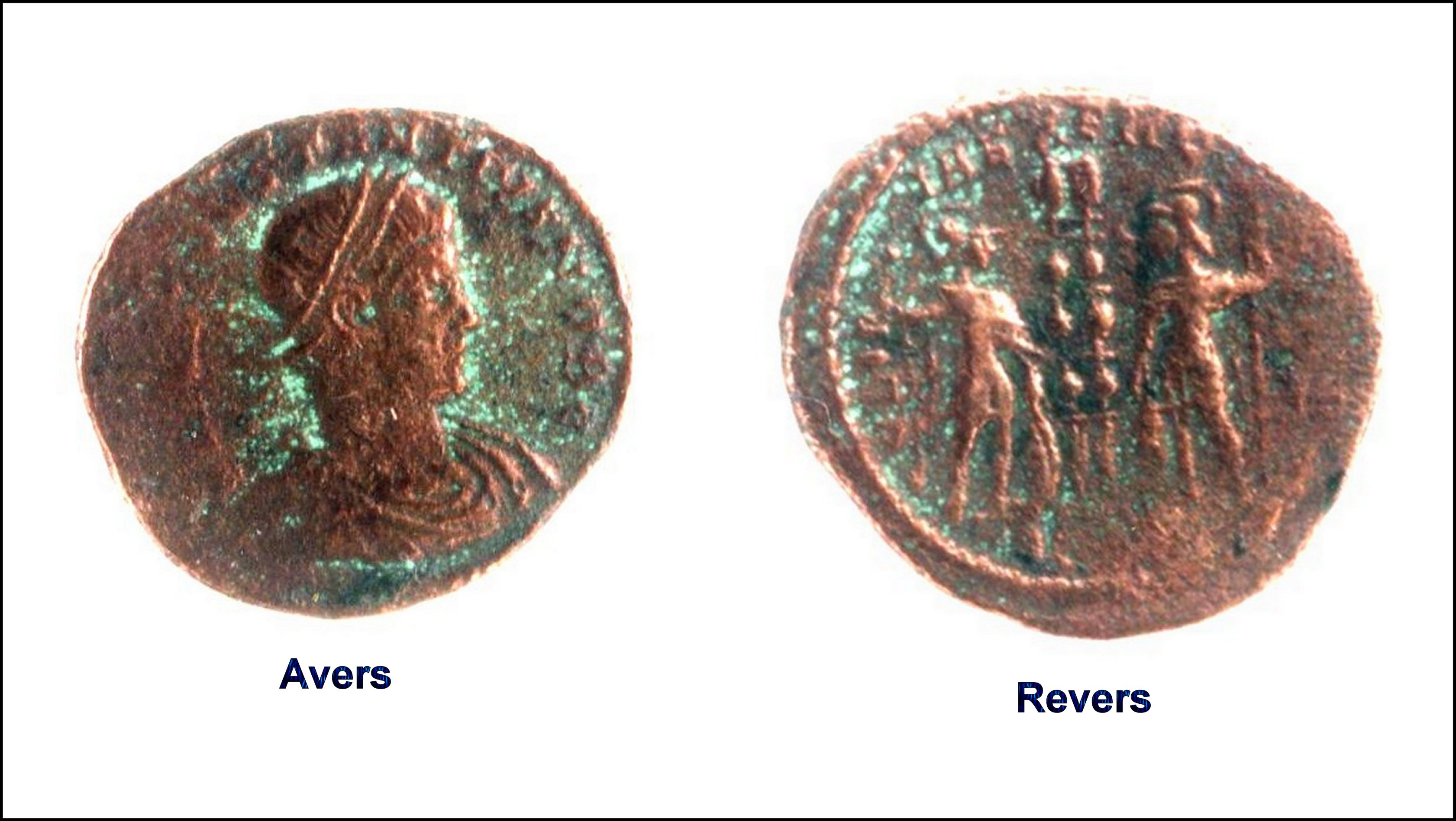 Nummus de Constance II, IV eme siècle,bronze, villa gallo-romaine de Vivios, Lespignan, Occitanie. Avers, à gauche et revers, à droite.